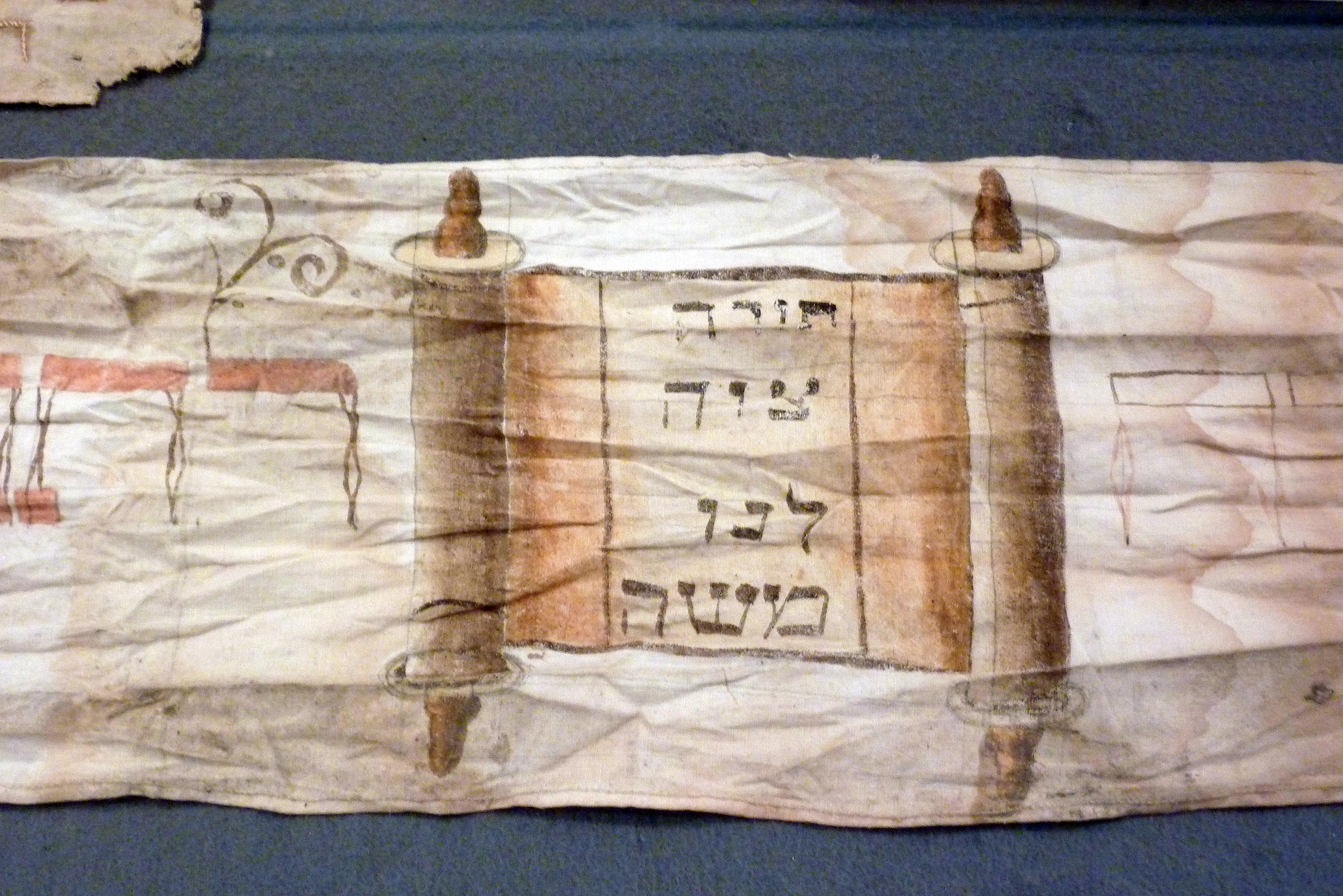 Genisa Niederzissen, Ausstellung in der ehemaligen Synagoge in Niederzissen im Landkreis Ahrweiler (Rheinland-Pfalz), Mappa (Torawimpel) für Nathan bar Chajjim von 1888, mit Abbildung einer Torarolle und der Inschrift: „Das ist die Tora, die uns von Mosche gebracht wurde.“ (Falk Wiesemann (Hrsg.): Zeugnisse jüdischen Lebens in Niederzissen. Genisa-Funde in der ehemaligen Synagoge. Kultur- und Heimatverein Niederzissen, Niederzissen 2012, ISBN 978-3-00-039493-5)